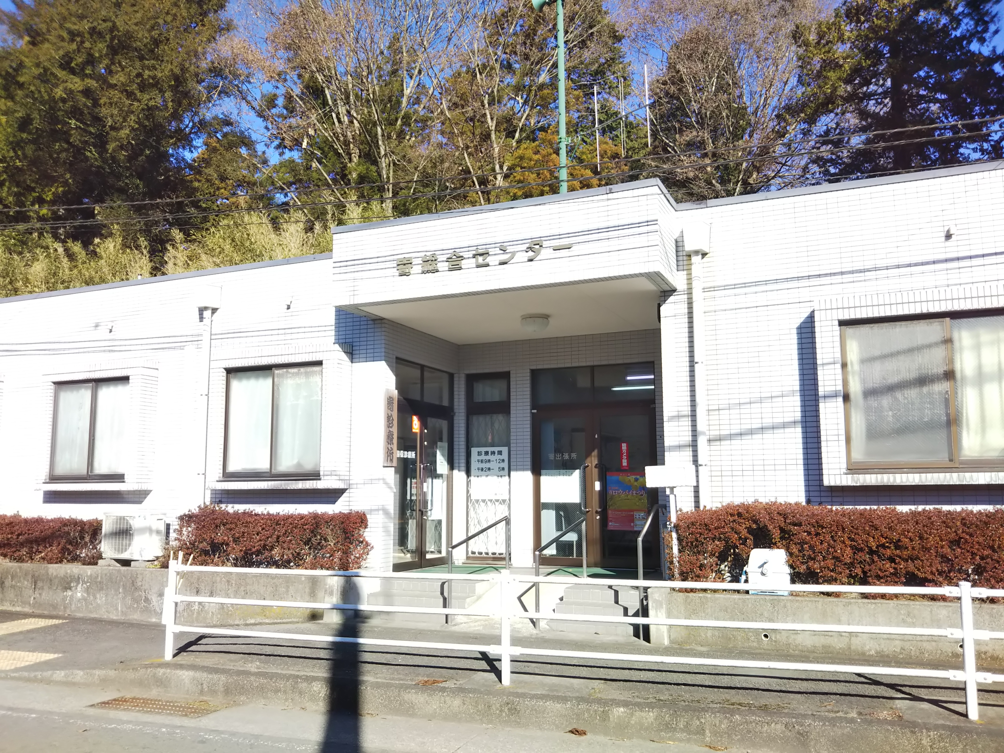 神奈川県足柄上郡松田町寄、役場支所や診療所を備えた「寄総合センター」